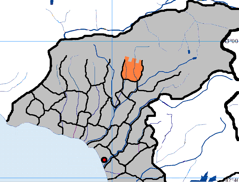 село Отап в Очамчирском районе